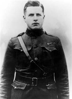 Erwin R. Bleckley